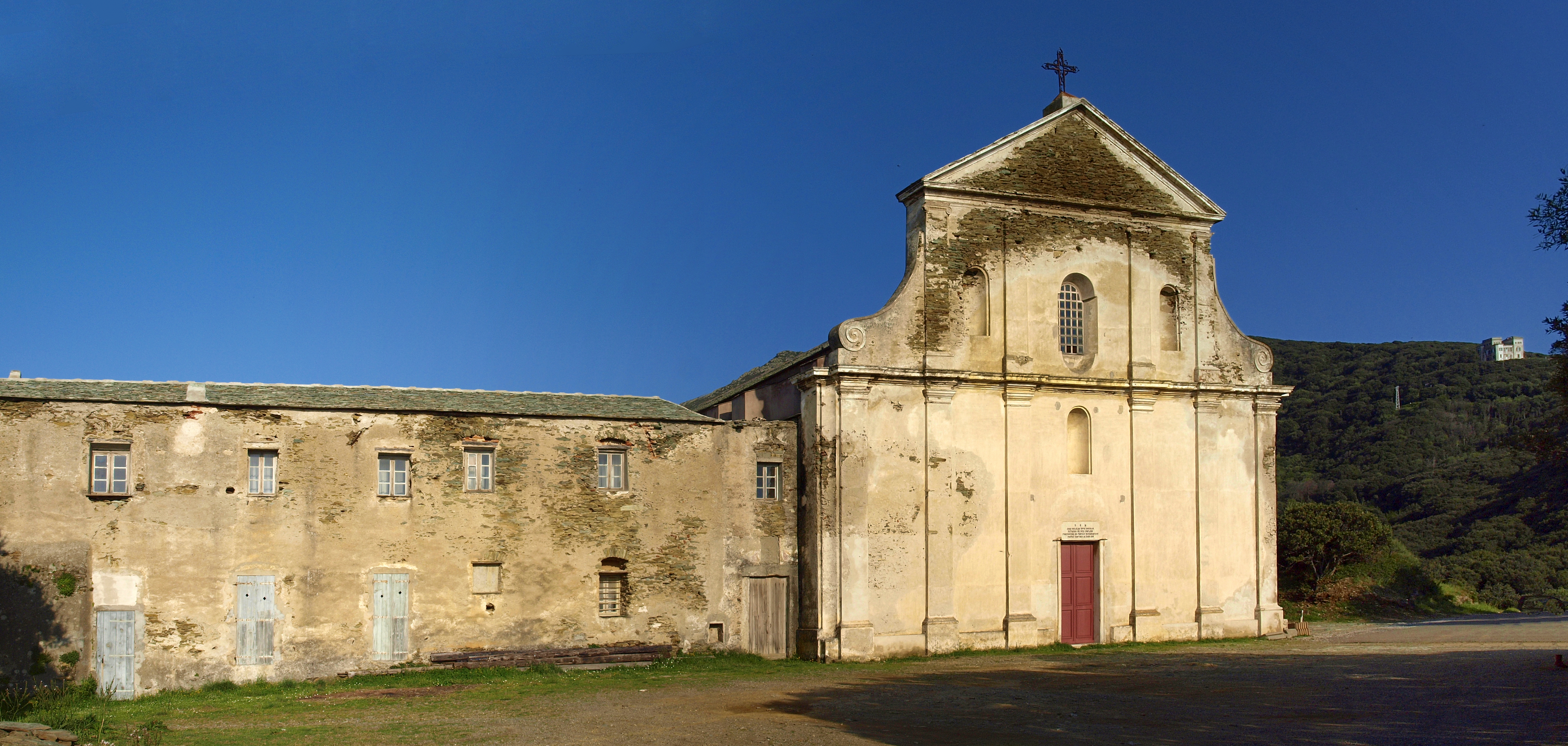 Morsiglia (Corsica) - Vue frontale du couvent de l'Annonciation